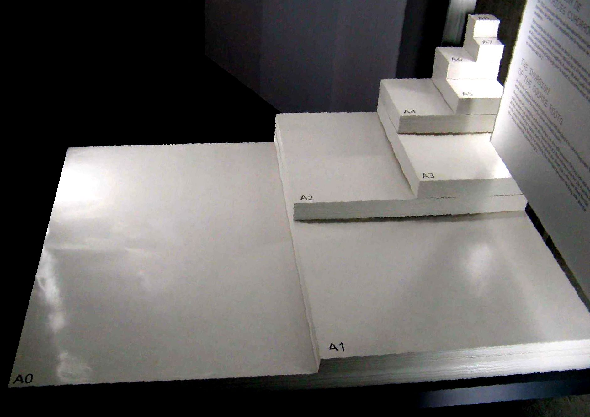 Modell der Papierformate A0 bis A8 in originaler Größe im Science-Museum, Barcelona